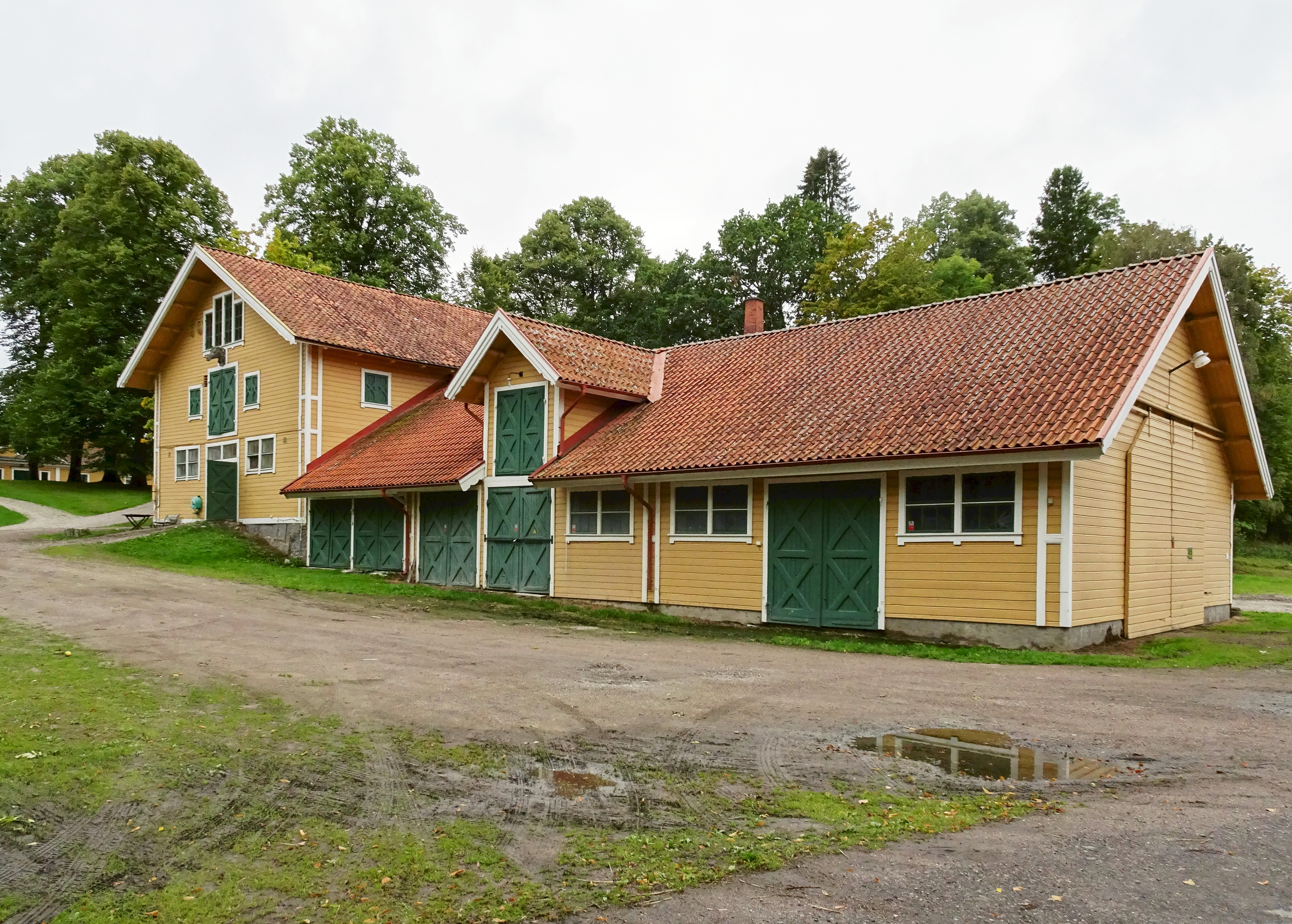 Ekensholm stall